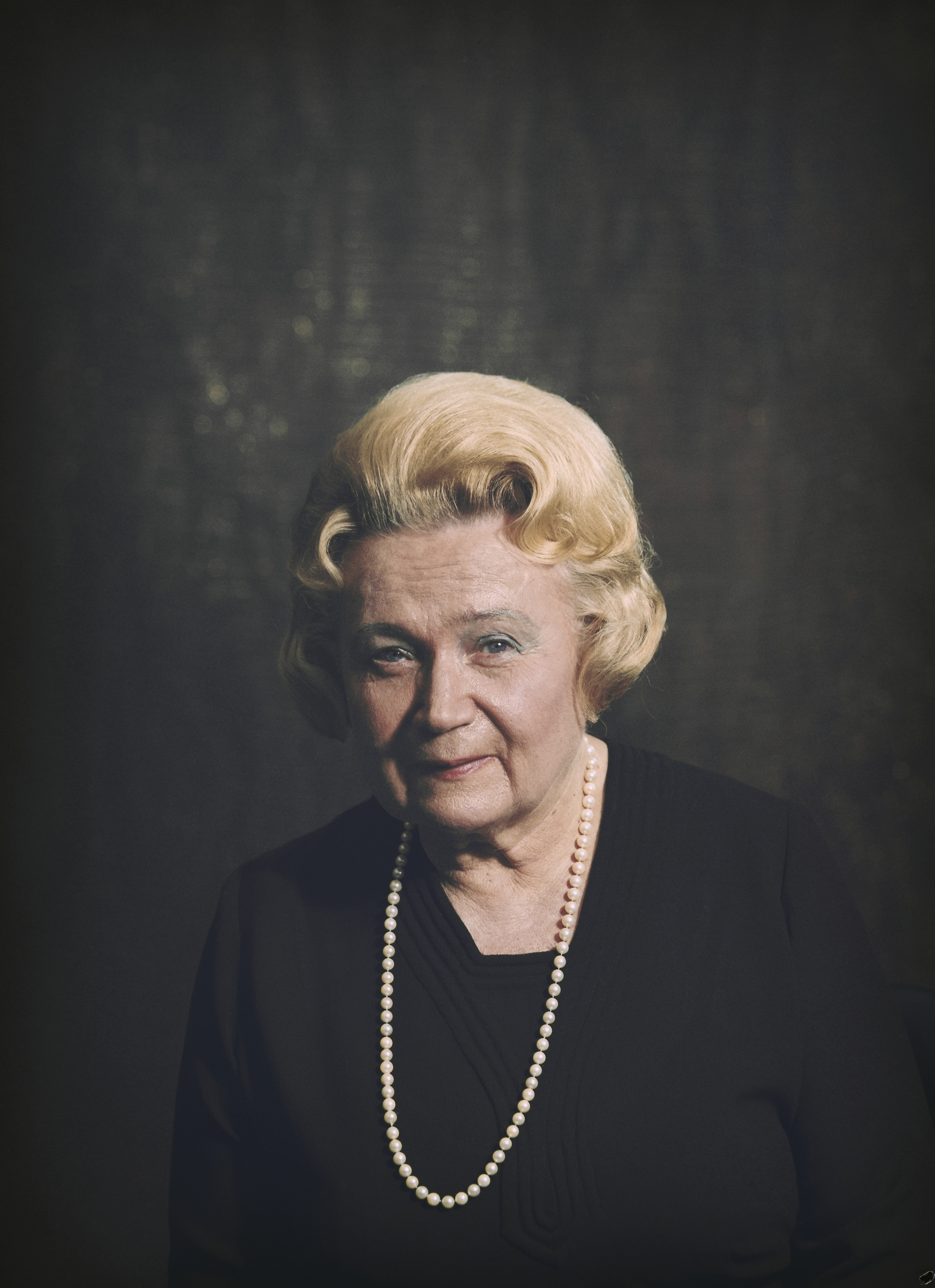 Voimistelunopettaja, järjestövaikuttaja ja professori Liisa Orko (1902–1987).